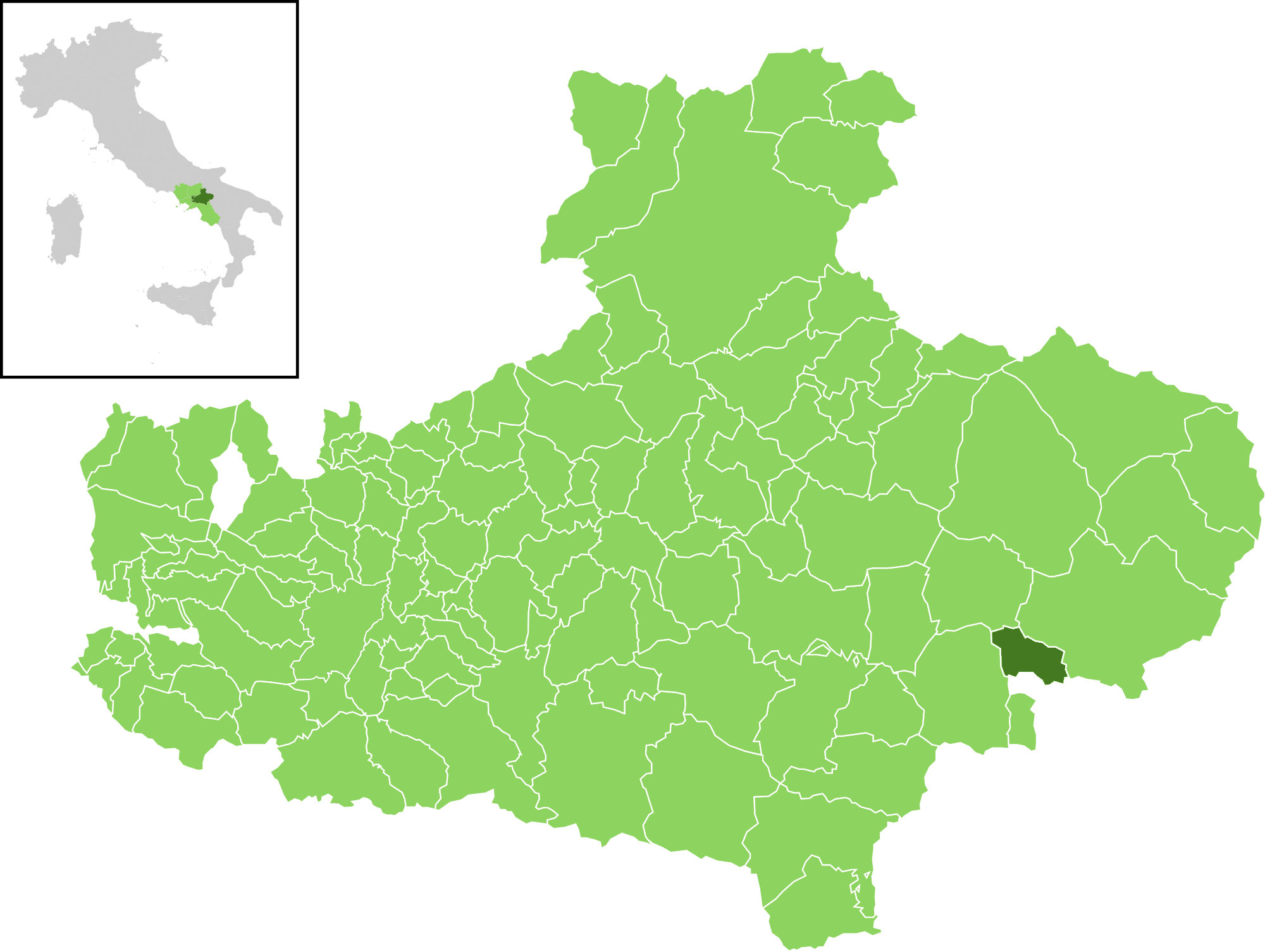 Il comune all'interno della provincia di Avellino